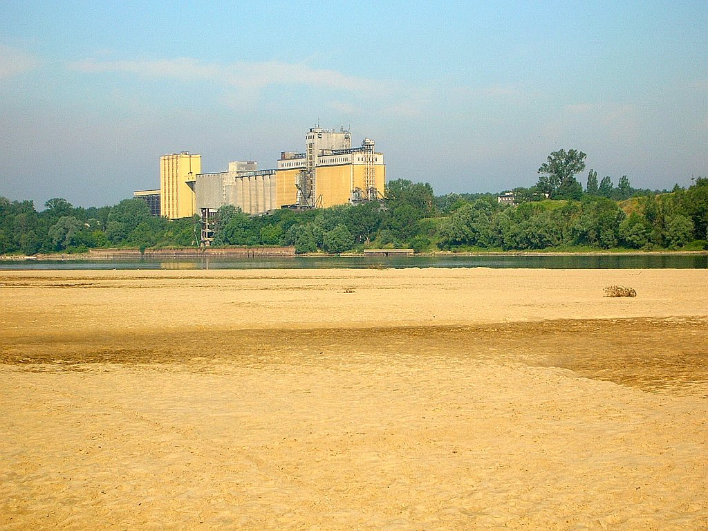 Wisła w Brdyujściu w Bydgoszczy. Zakłady Globalmalt Polska z mielizny na rzece